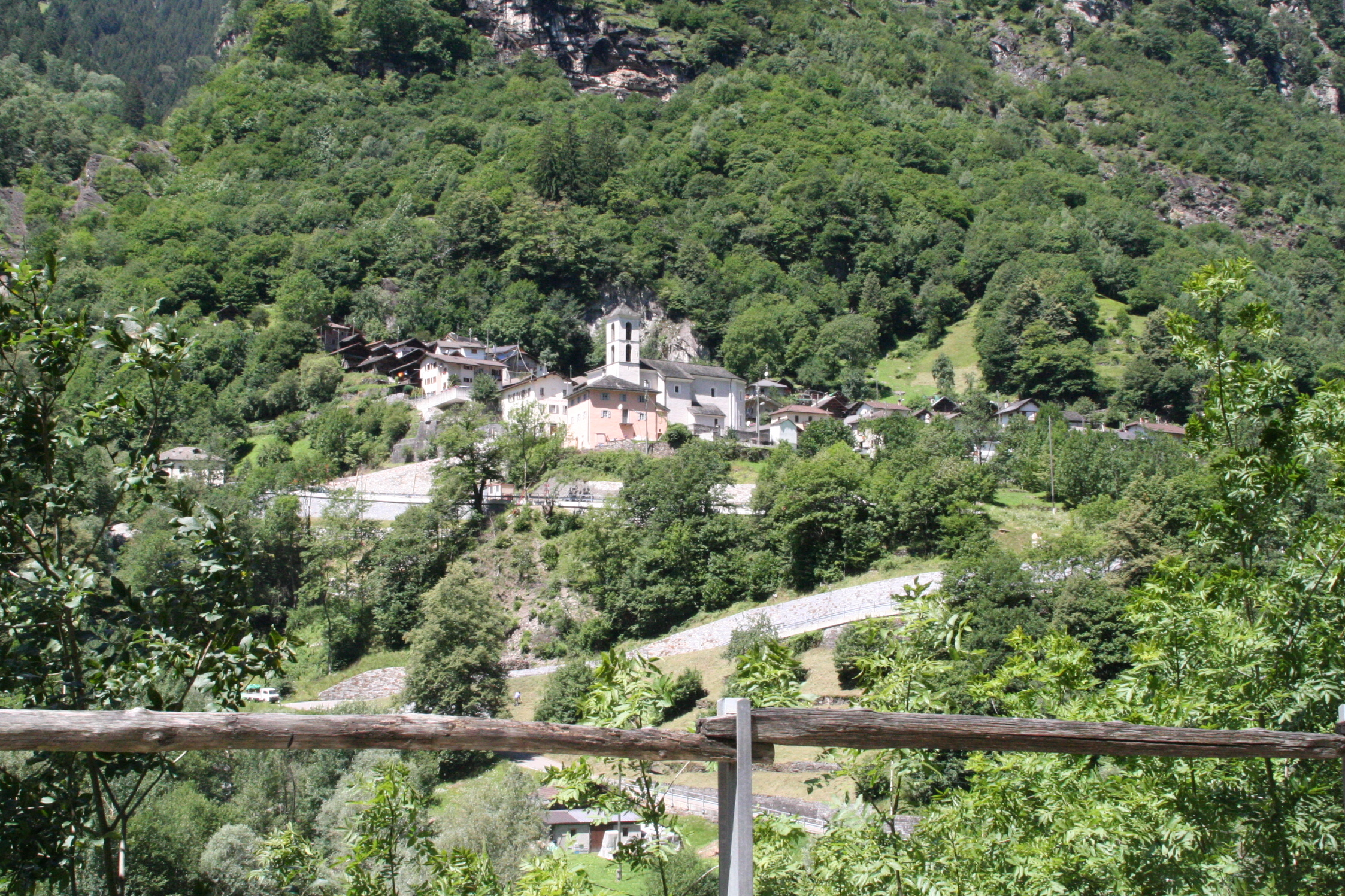 Buseno